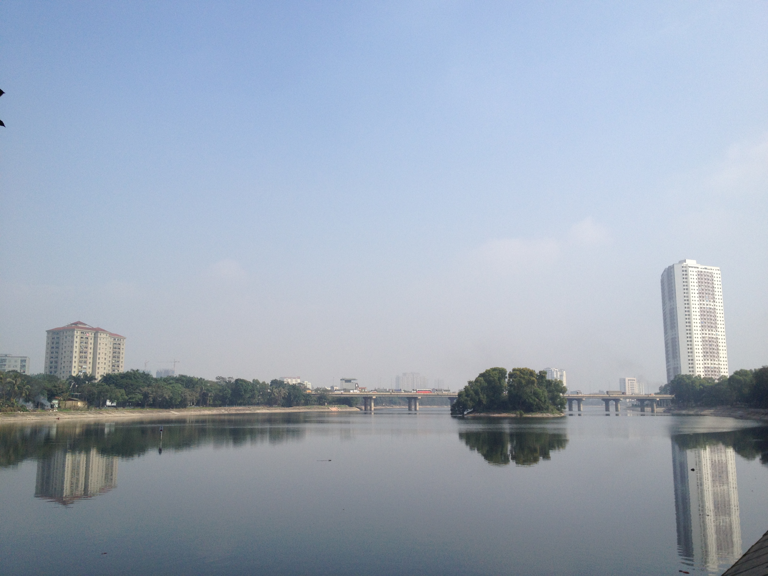 Hà Nội, Việt Nam.